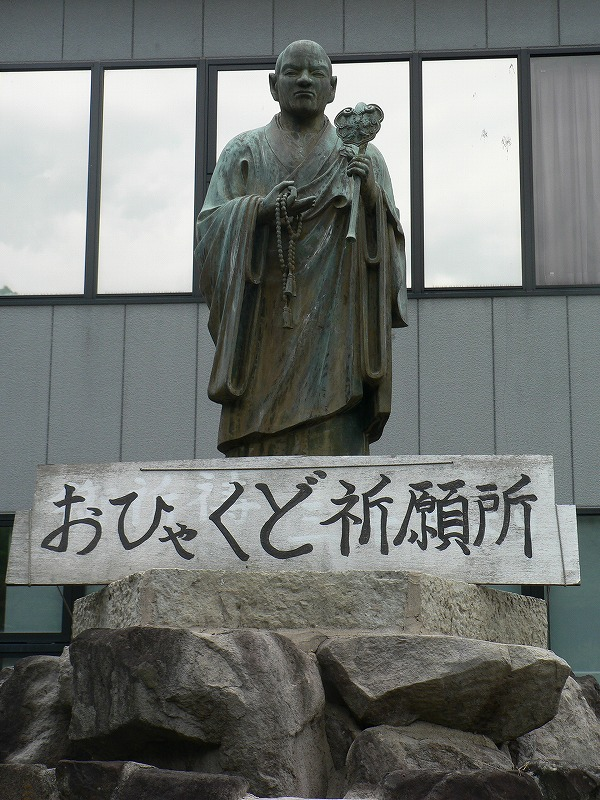 The bronze statue of Gyōki at Ebara-ji temple , Sakai,Osaka,Japan. （大阪府堺市の家原寺にあるja:行基の銅像）